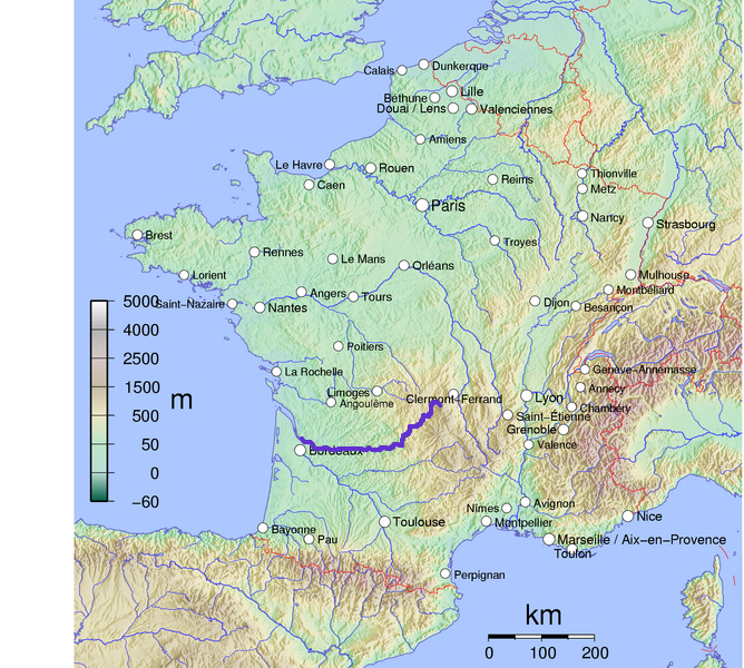 Kaart Dordogne gebaseerd op Kaart Frankrijk van Wikimedia Commons